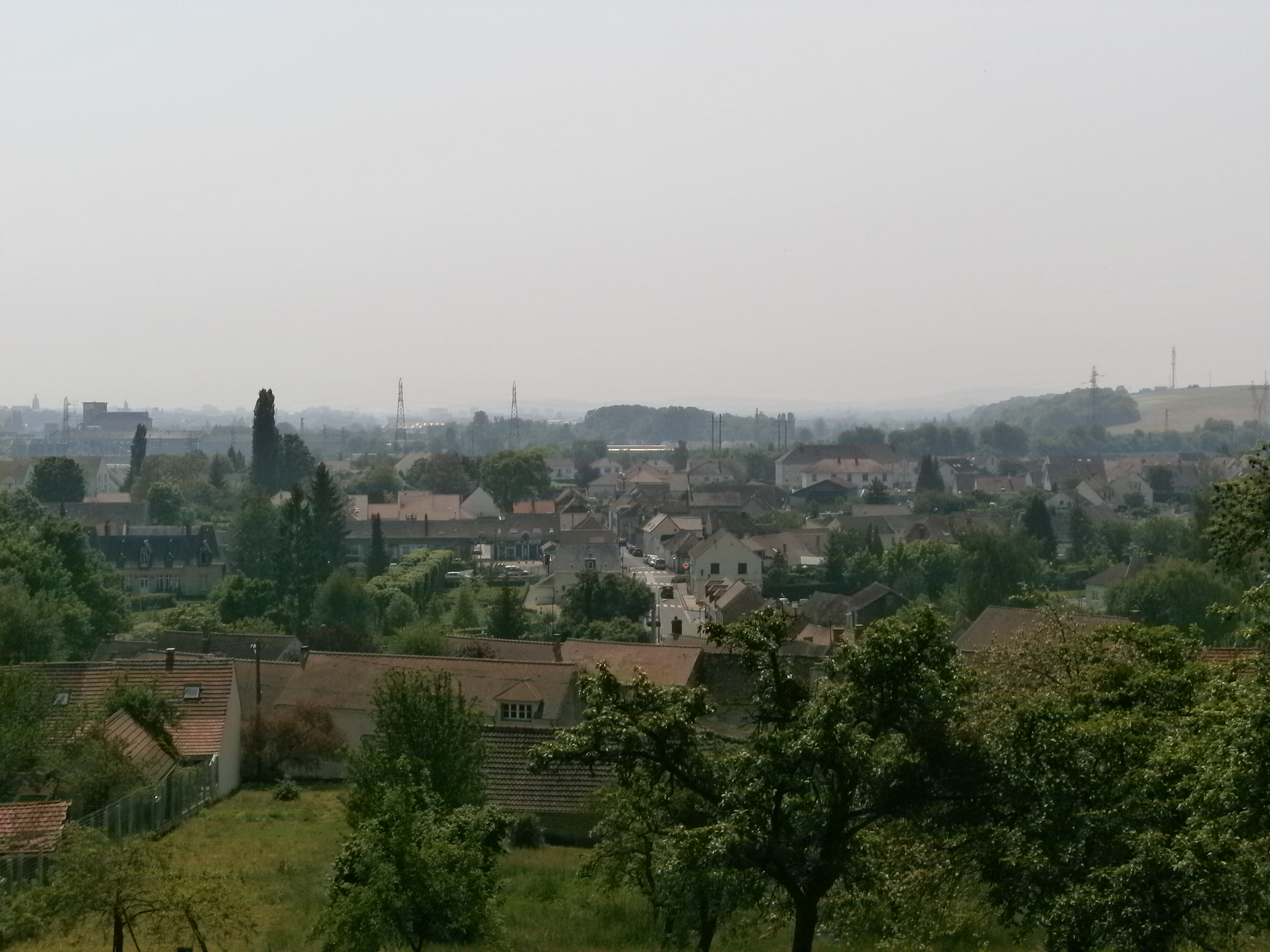 Vue générale de Clairoix